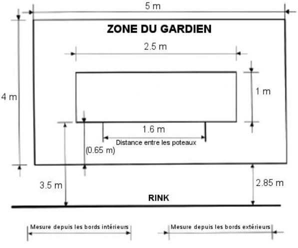 Dimension de la zone du gardien sur un terrain de floorball